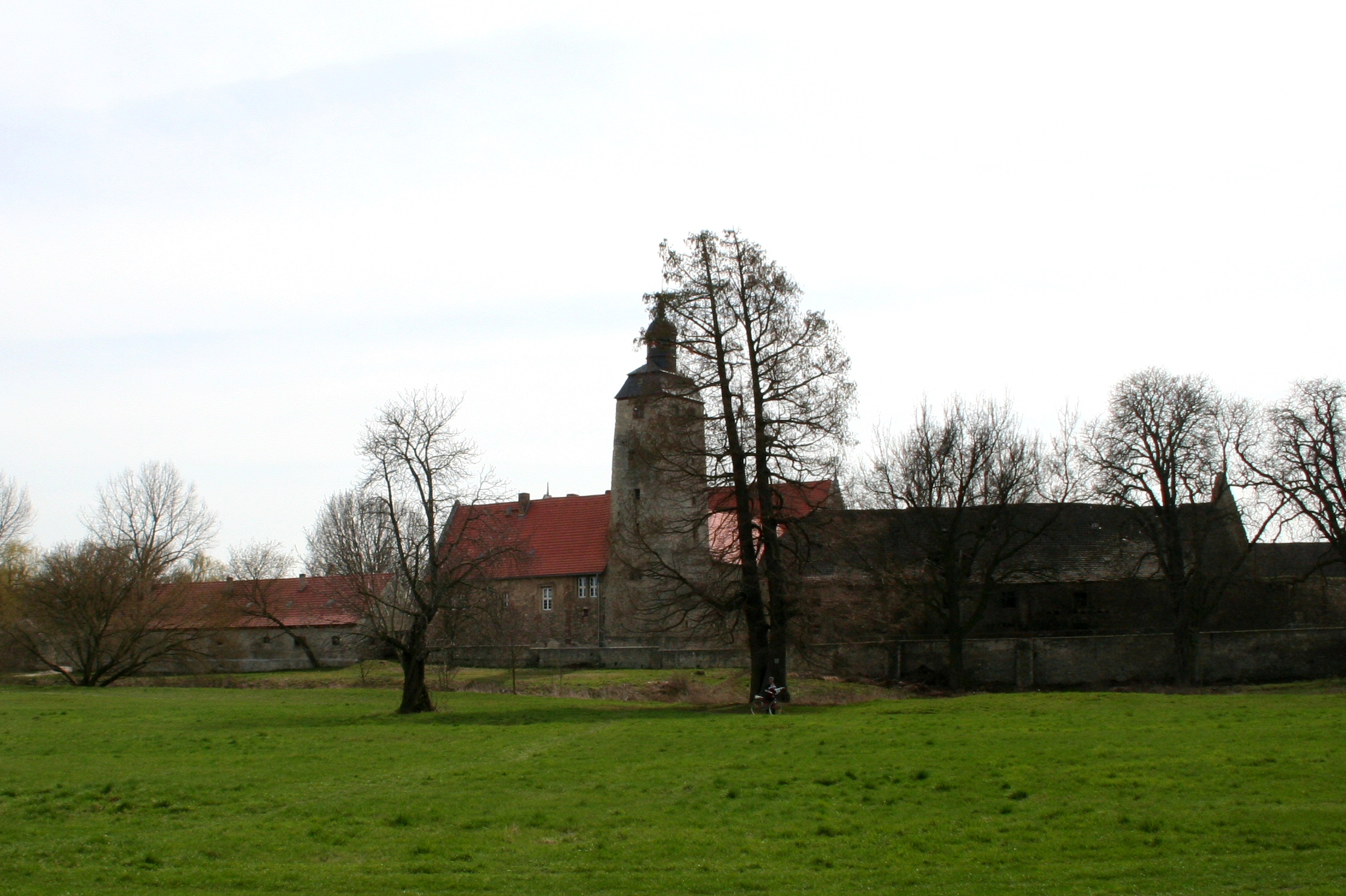 Wasserburg Egeln